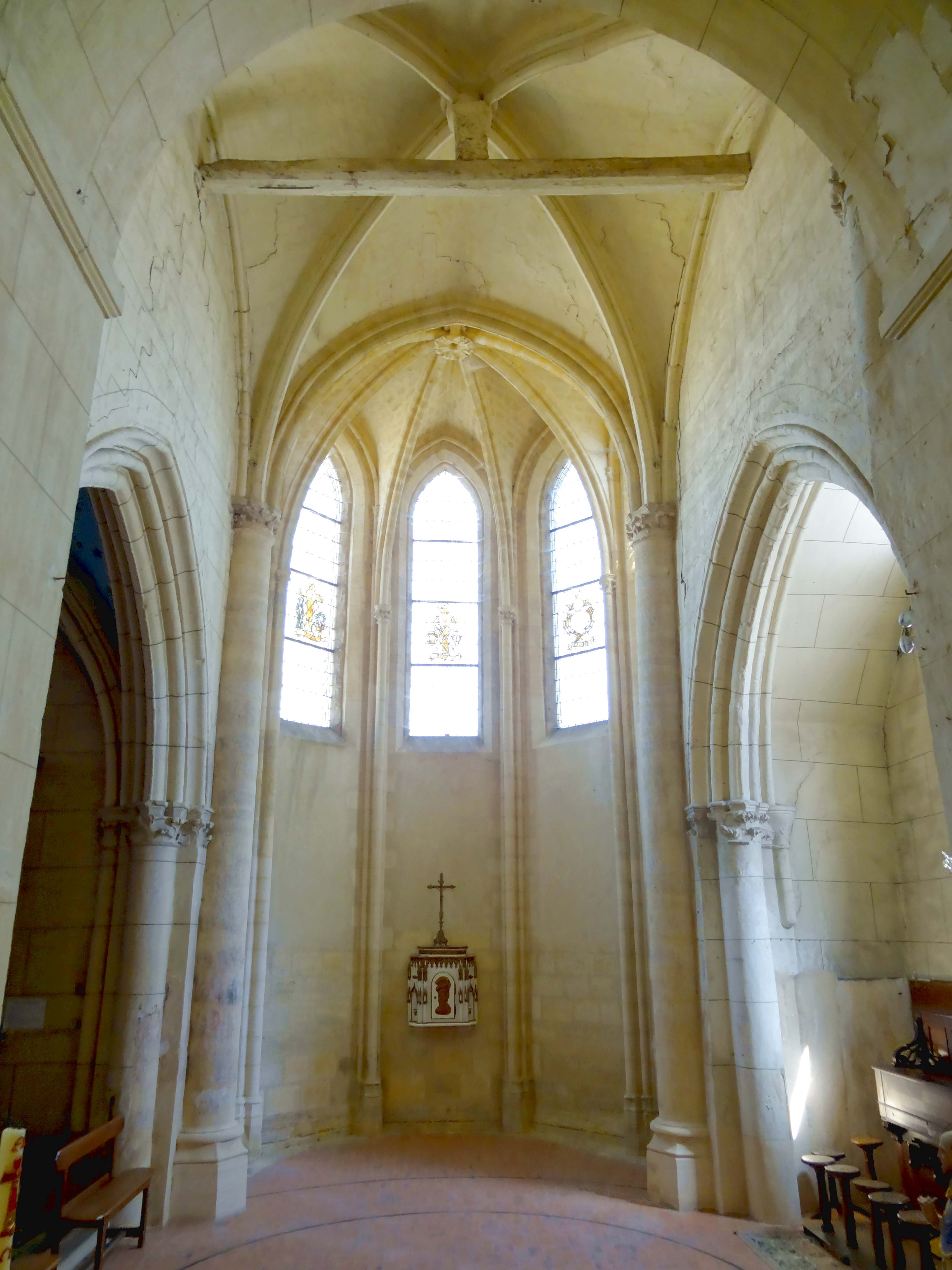 Intérieur de l'église - voir titre.